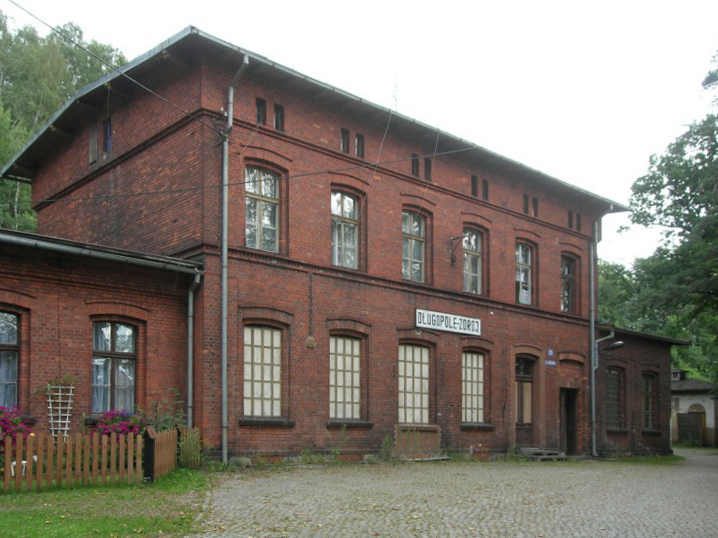 Bahnhof Bad Langenau (Długopole Zdrój) auf dem 1875 in Betrieb genommenen Streckenabschnitt der Bahnstrecke Breslau - Mittelwalde, Niederschlesien, Polen.